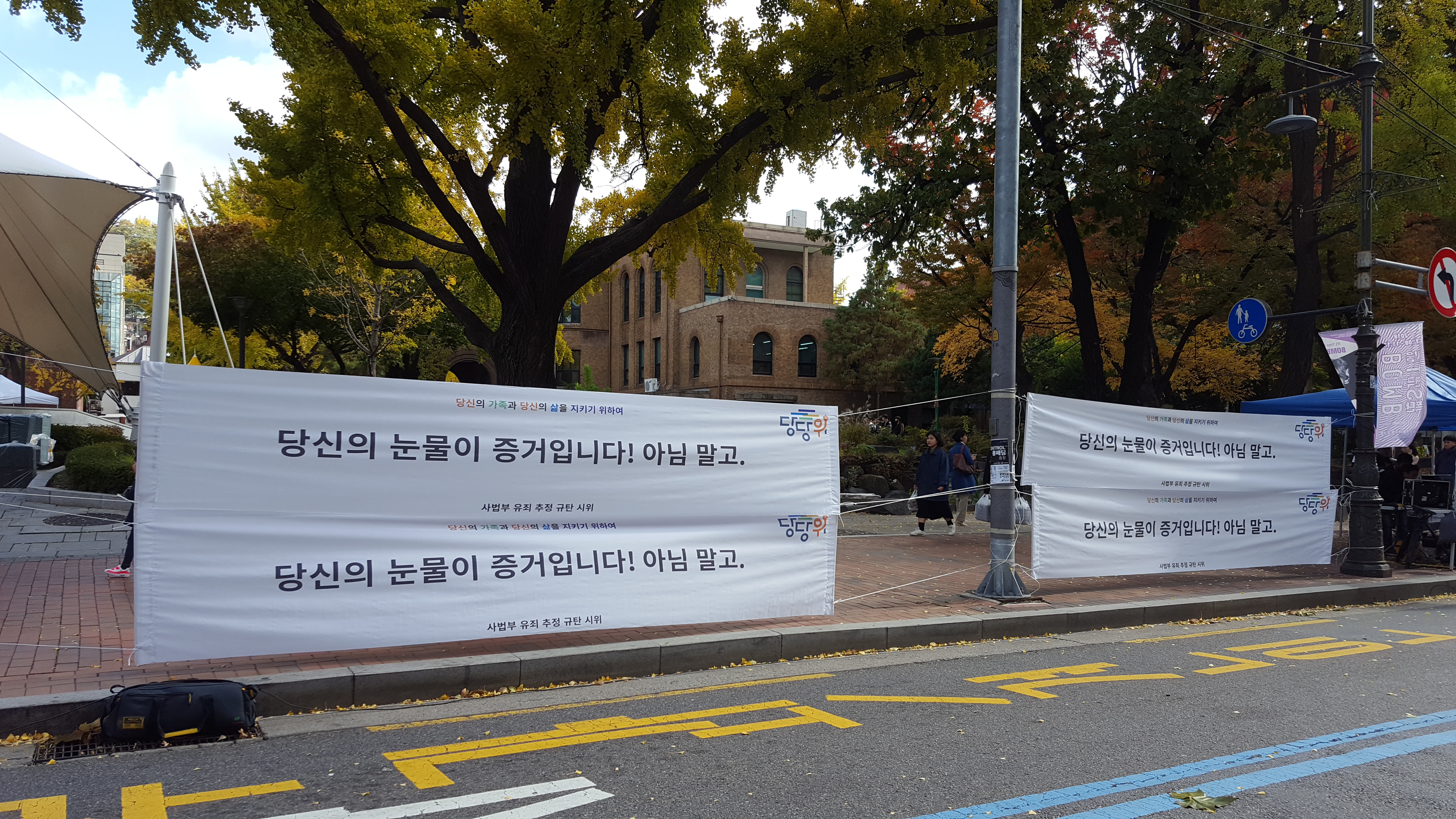 2018년 10월 27일 서울특별시 종로구 혜화역 2번 출구에 걸려있는 무분별한 성범죄 의혹 폭로와 이를 통한 유죄추정을 비판하는 현수막